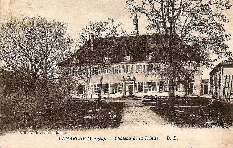 Château de la Trinité à Lamarche (Vosges) au début du XXe siècle